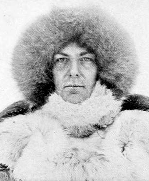 Der schwedische Botaniker Thorild Wulff (1877-1917) auf der 2. Thule-Expedition.